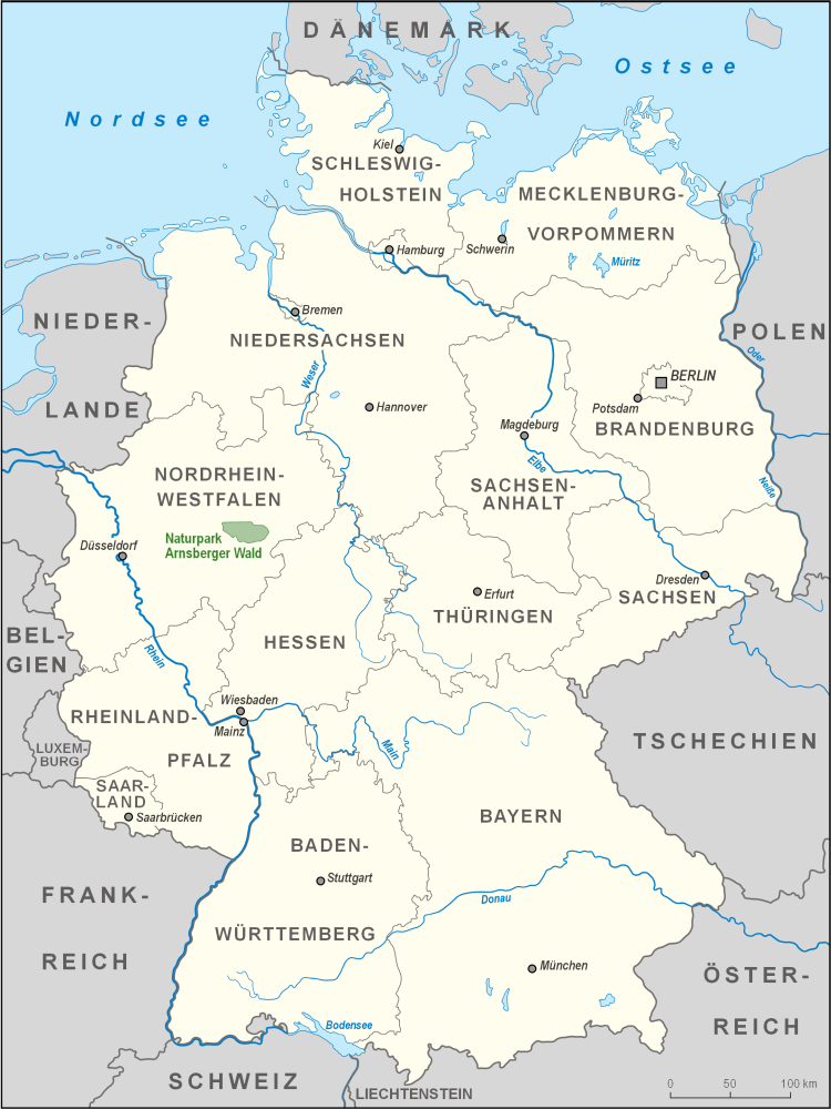 Karte des Naturparks Arnsberger Wald in Deutschland